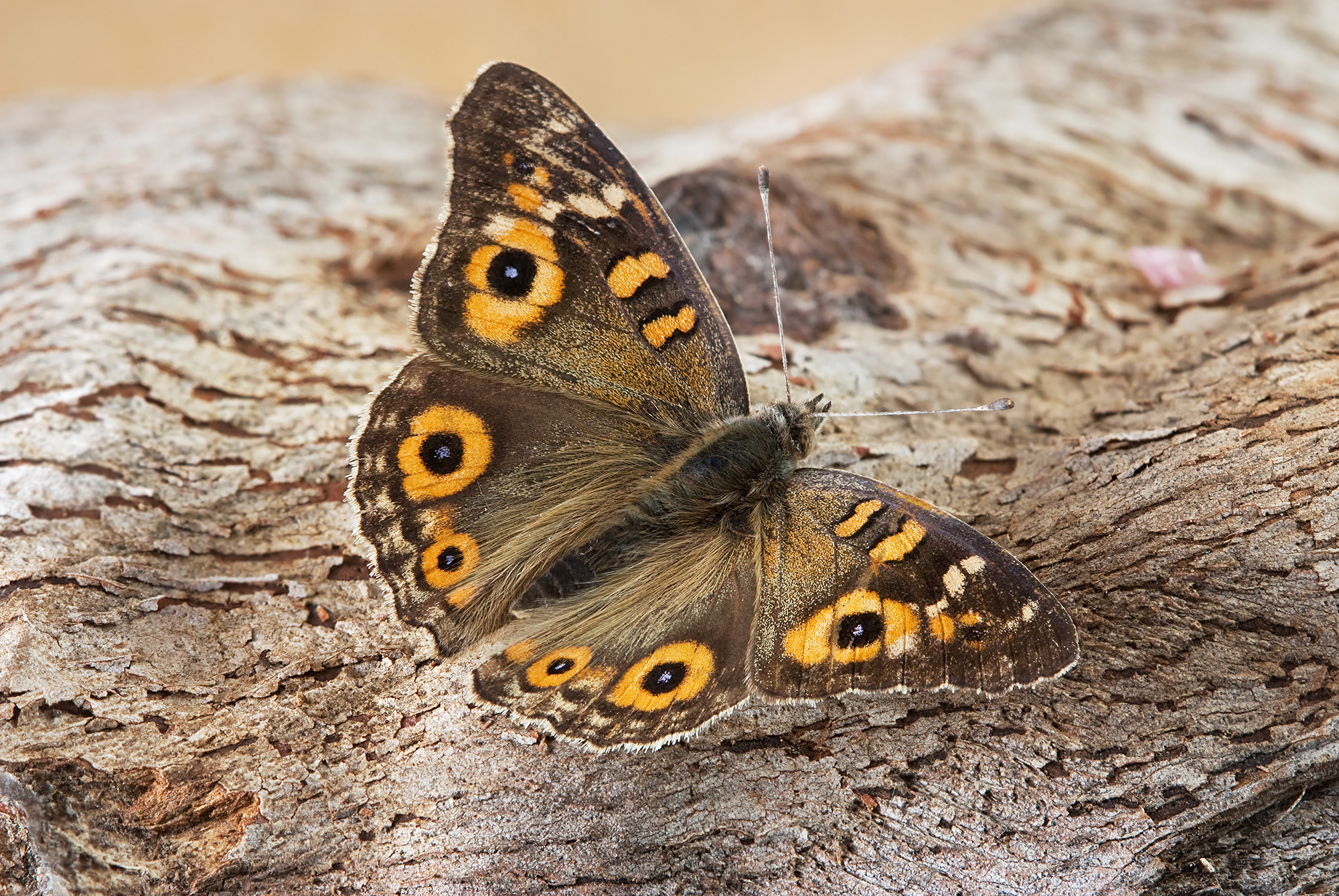 1.2 only